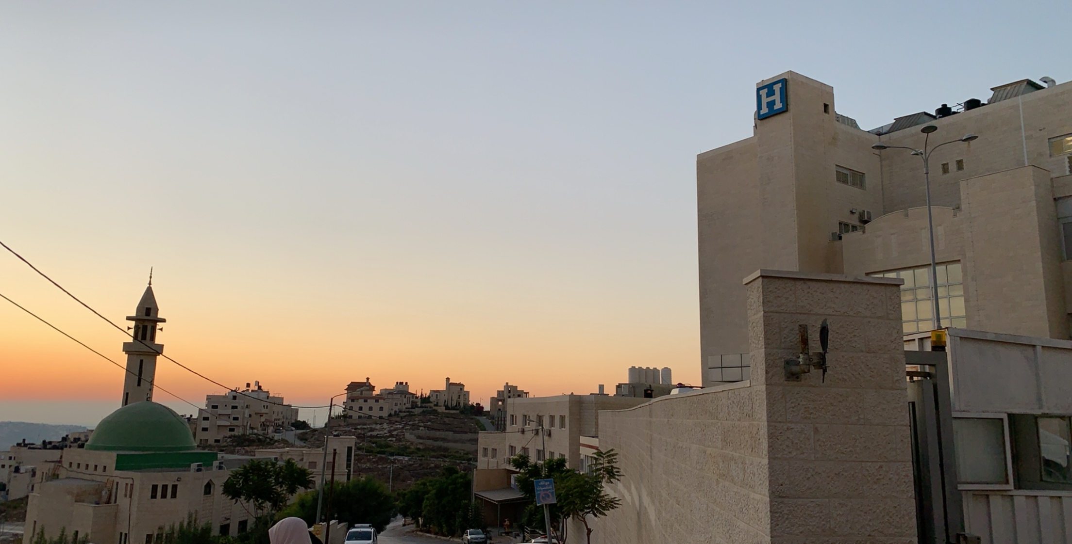 مستشفى النجاح الوطني الجامعي، نابلس، فلسطين 2019